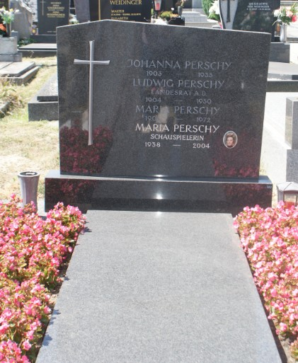 Grab Maria Perschy-Friedhof Oberberg Eisenstadt